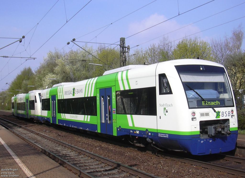 RegioShuttle der Breisgau-S-Bahn (VT 012 + VT 018) im Bahnhof Gundelfingen